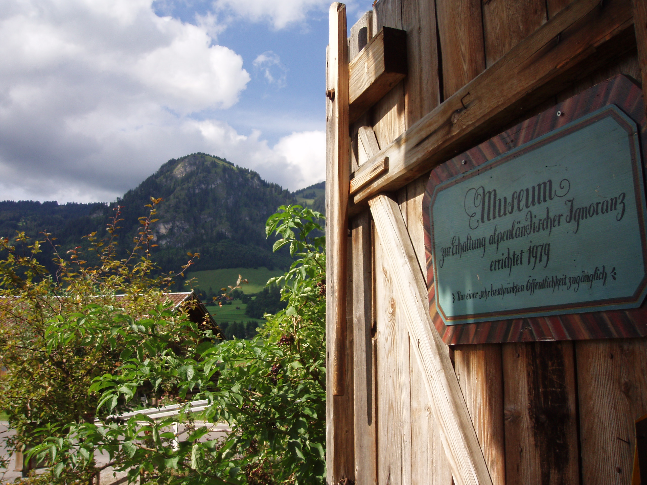 Tür + Hinweisschild der Oberen Mühle in Bad Oberdorf